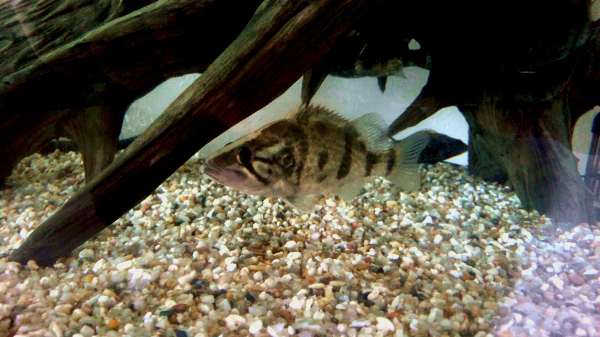 水槽にて飼育中のナンシオヤニラミ